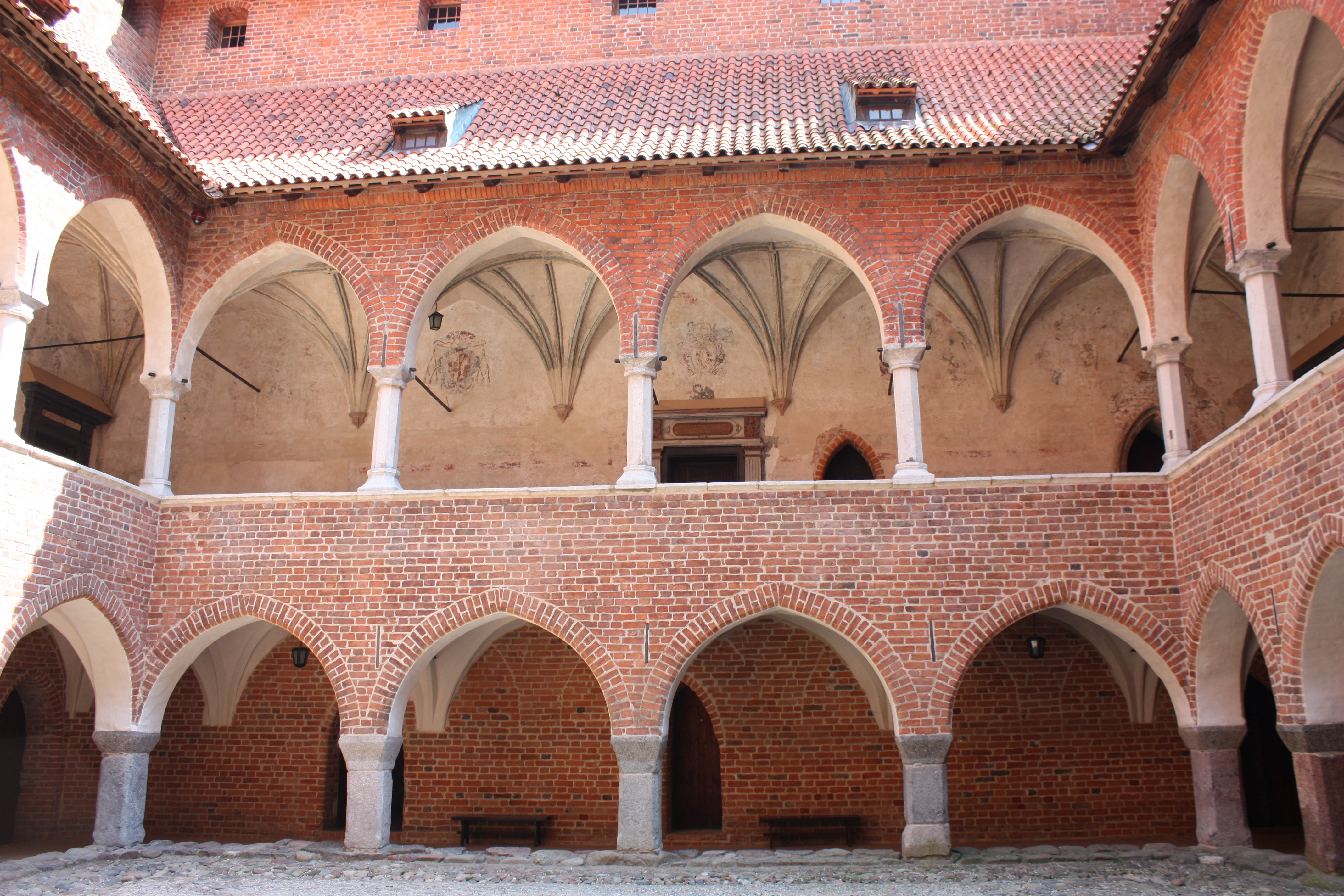 Lidzbark Warmiński, zamek biskupi, ob. muzeum, XIV, XIX